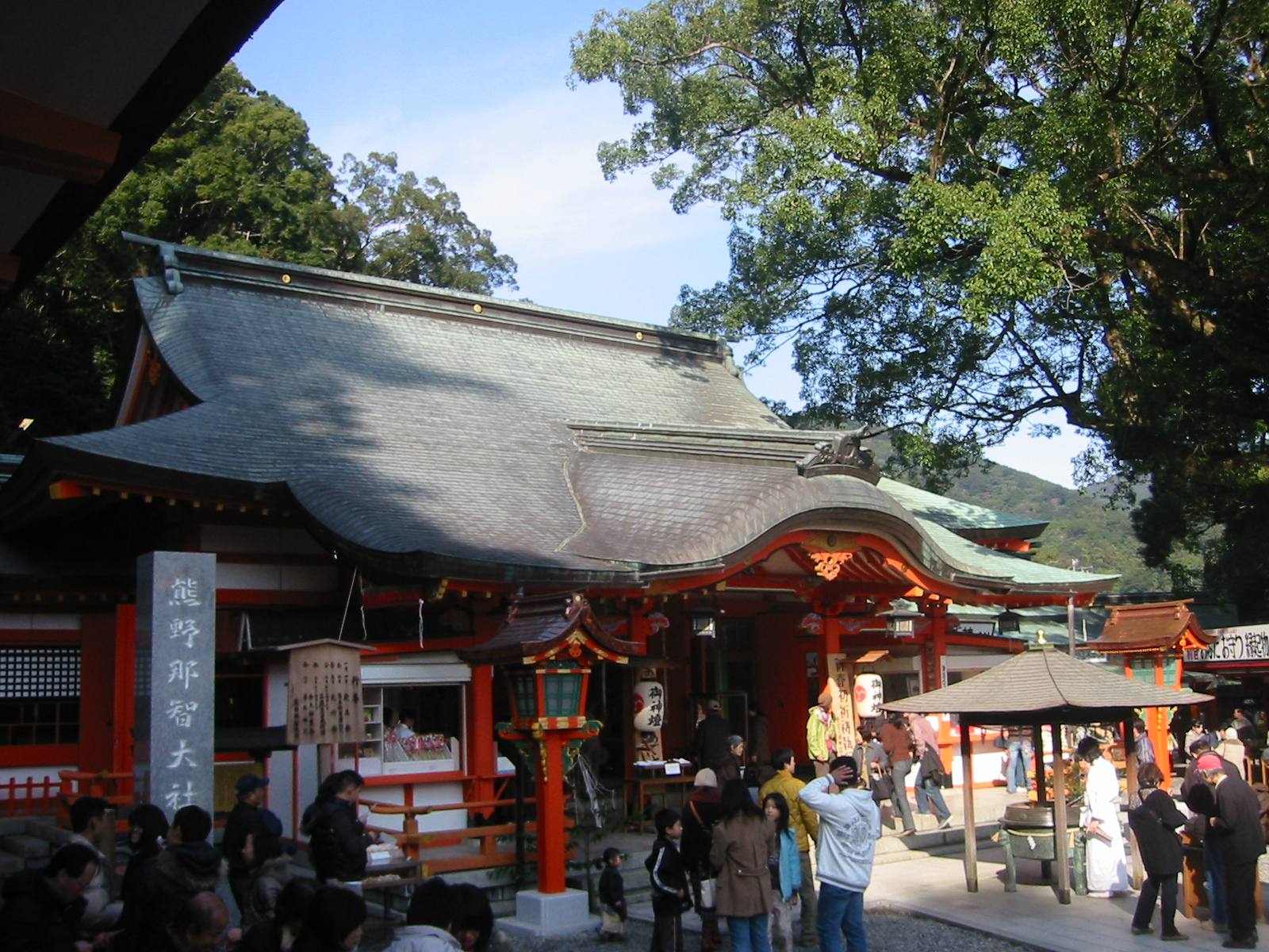 熊野那智大社で初詣